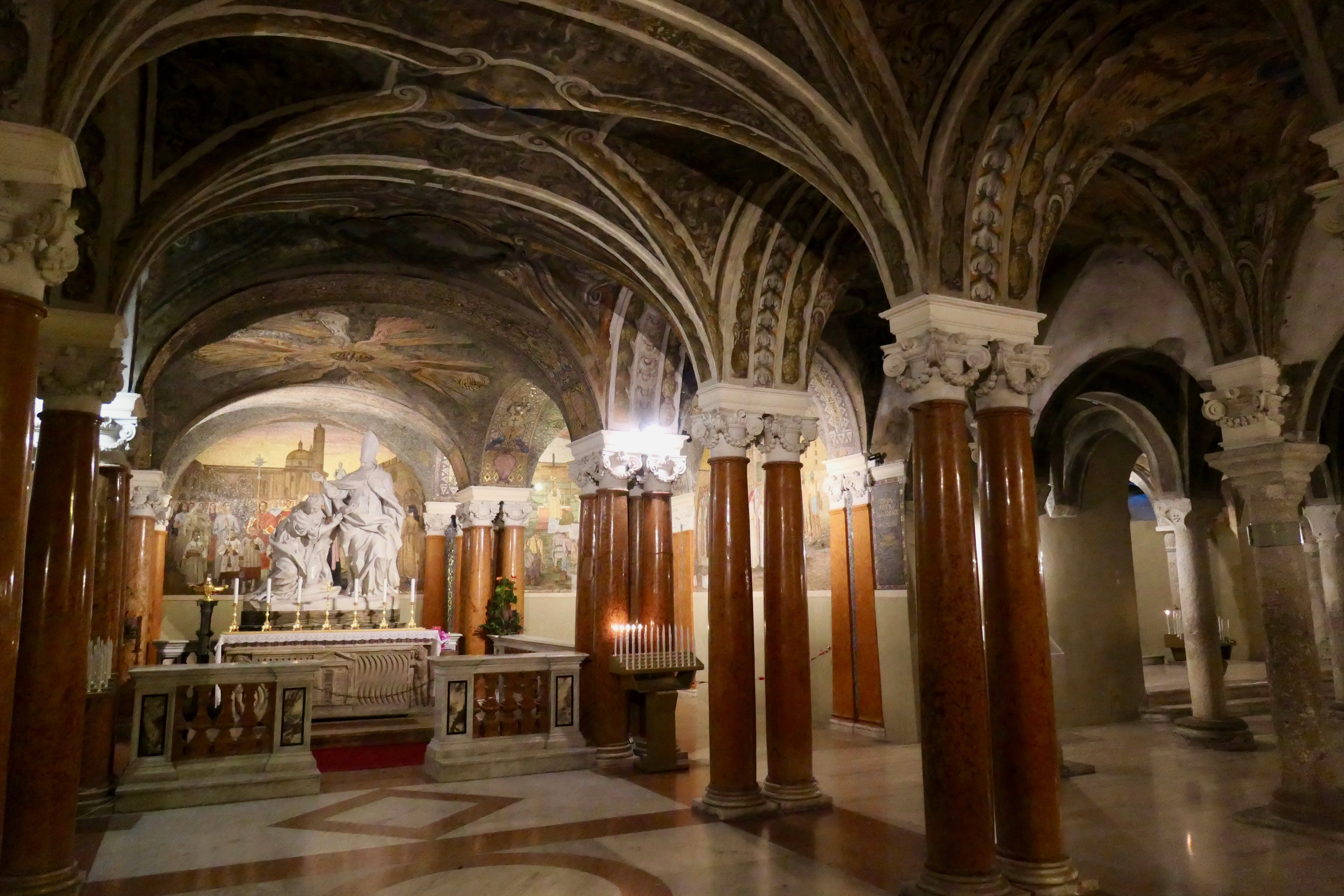 Cripta